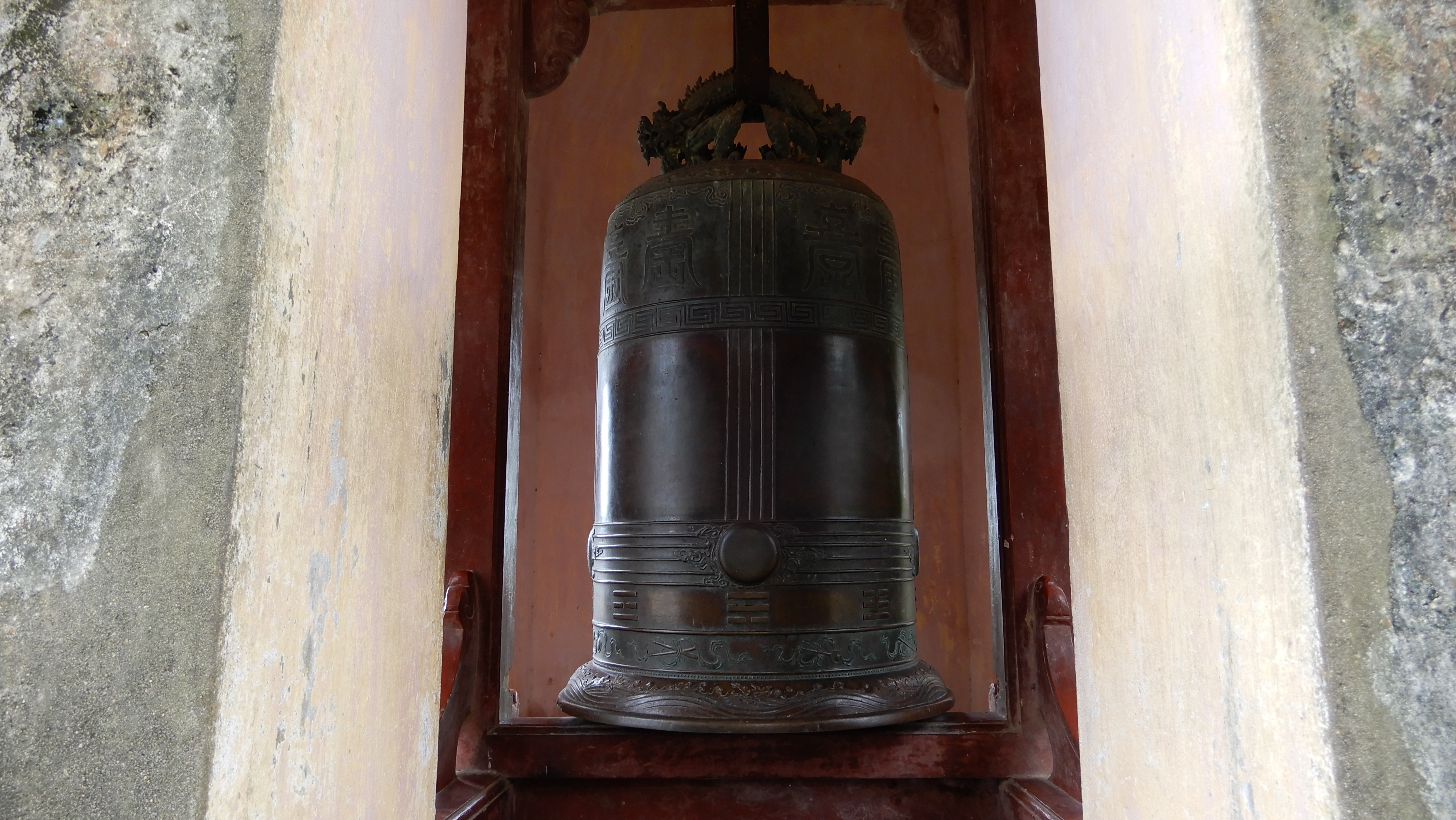 Vietnam, Pagode der himmlischen Frau, Thien Mu-Pagode, Glocke